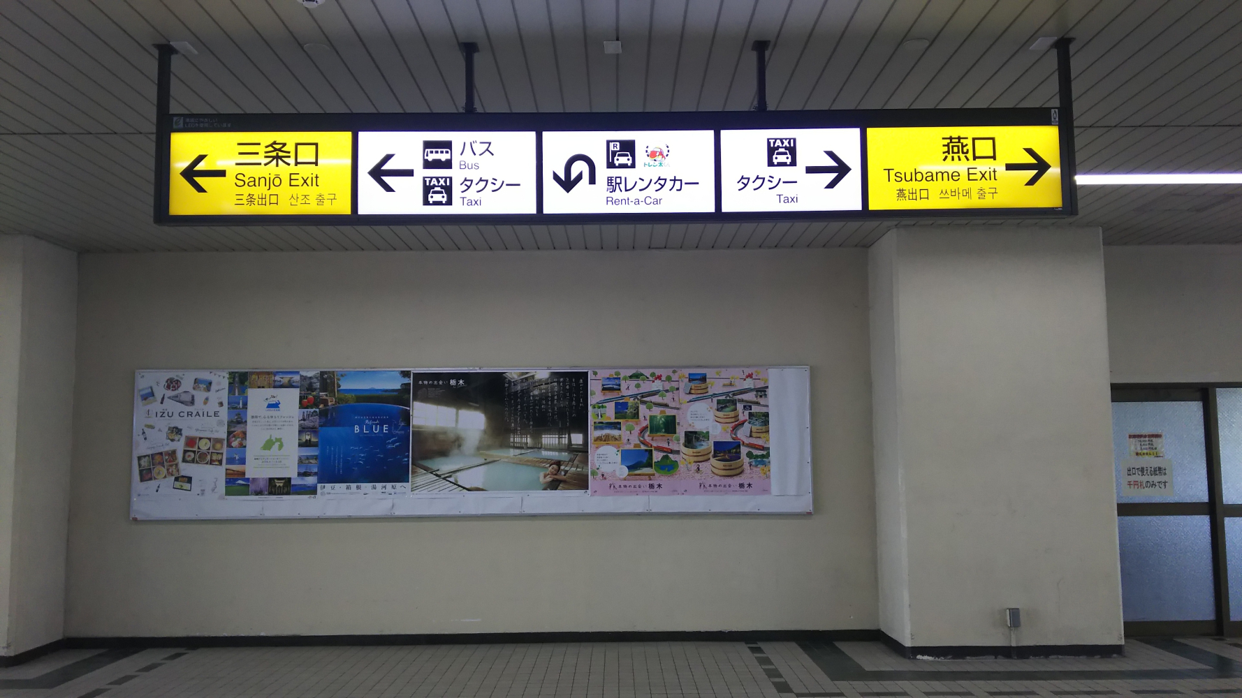 燕三条駅燕口・三条口